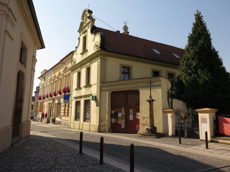 Dům čp. 5, náměstí T. G. Masaryka 5, Dobřany.